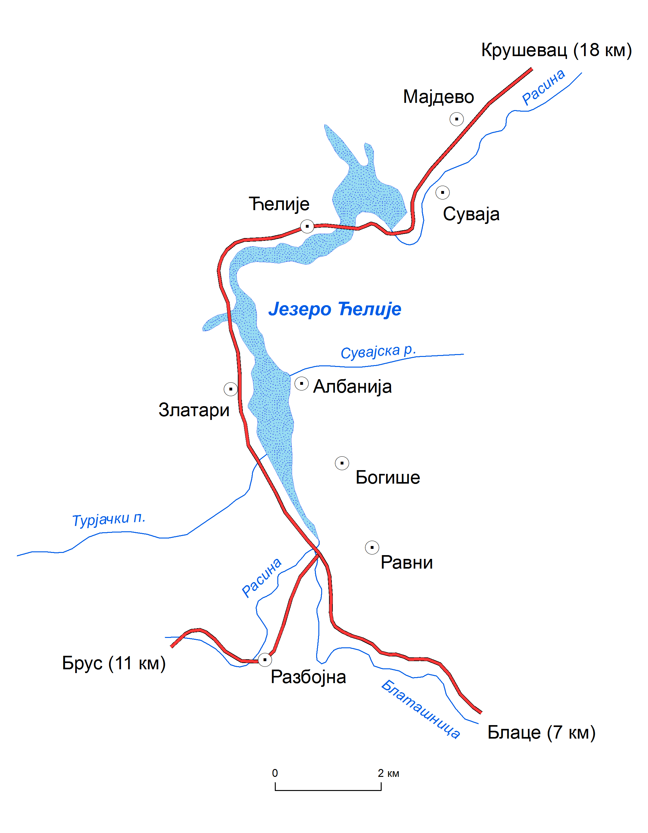 Мапа језера Ћелије у ЈПГ формату